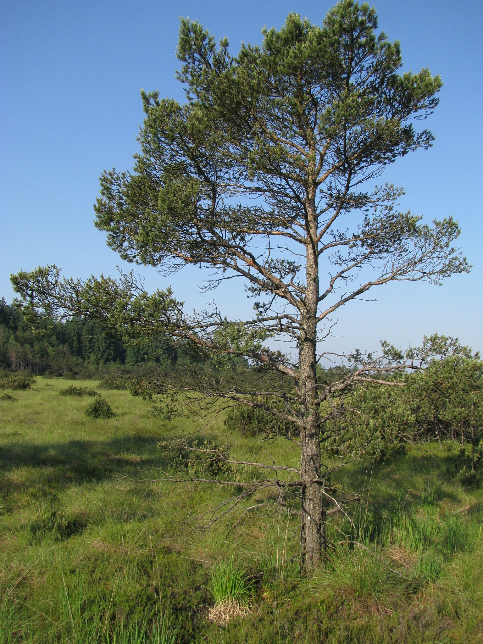 Waldkiefer im NSG Kirchseefilzen